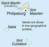 SSS islands